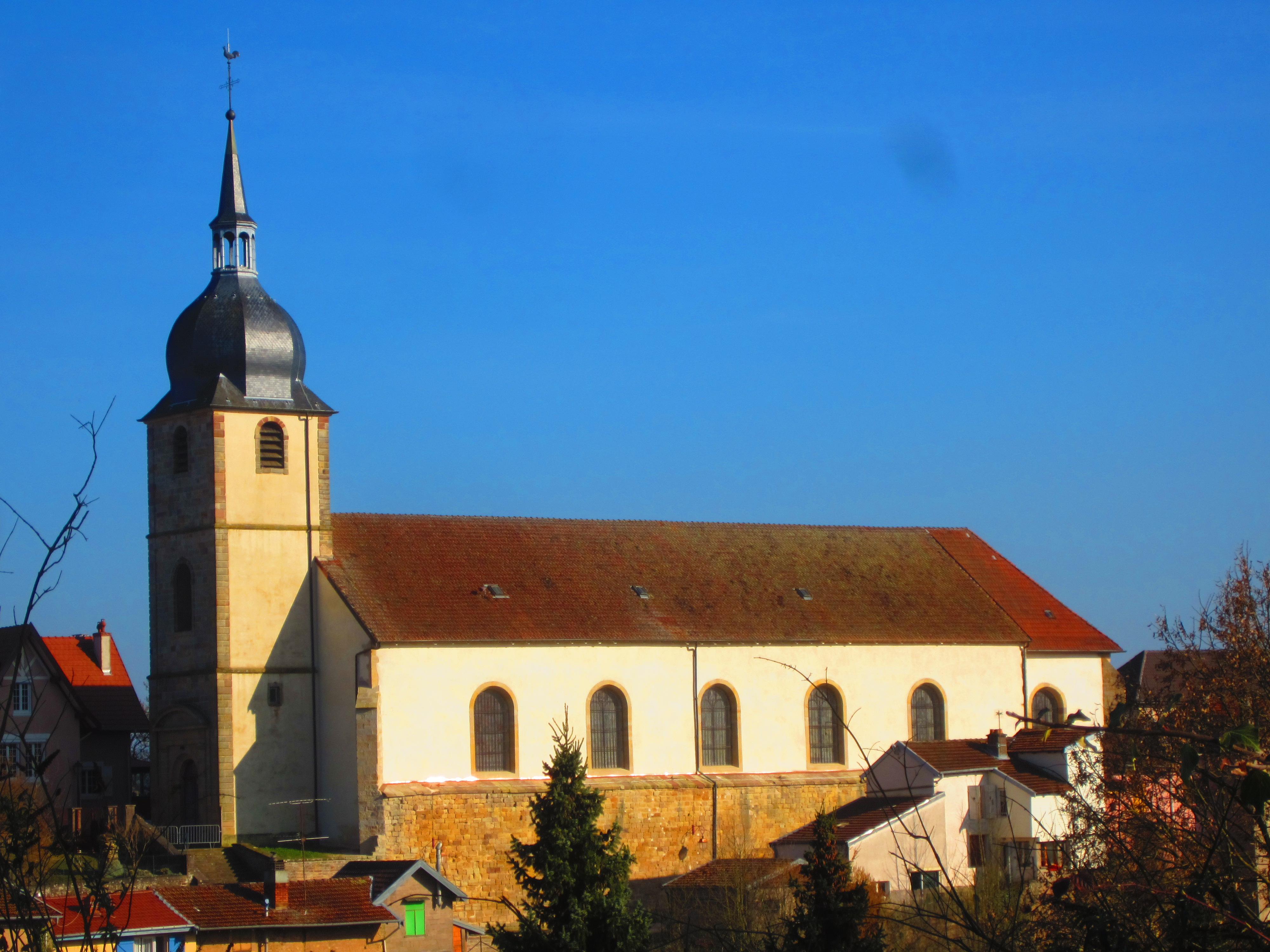 Deneuvre eglise